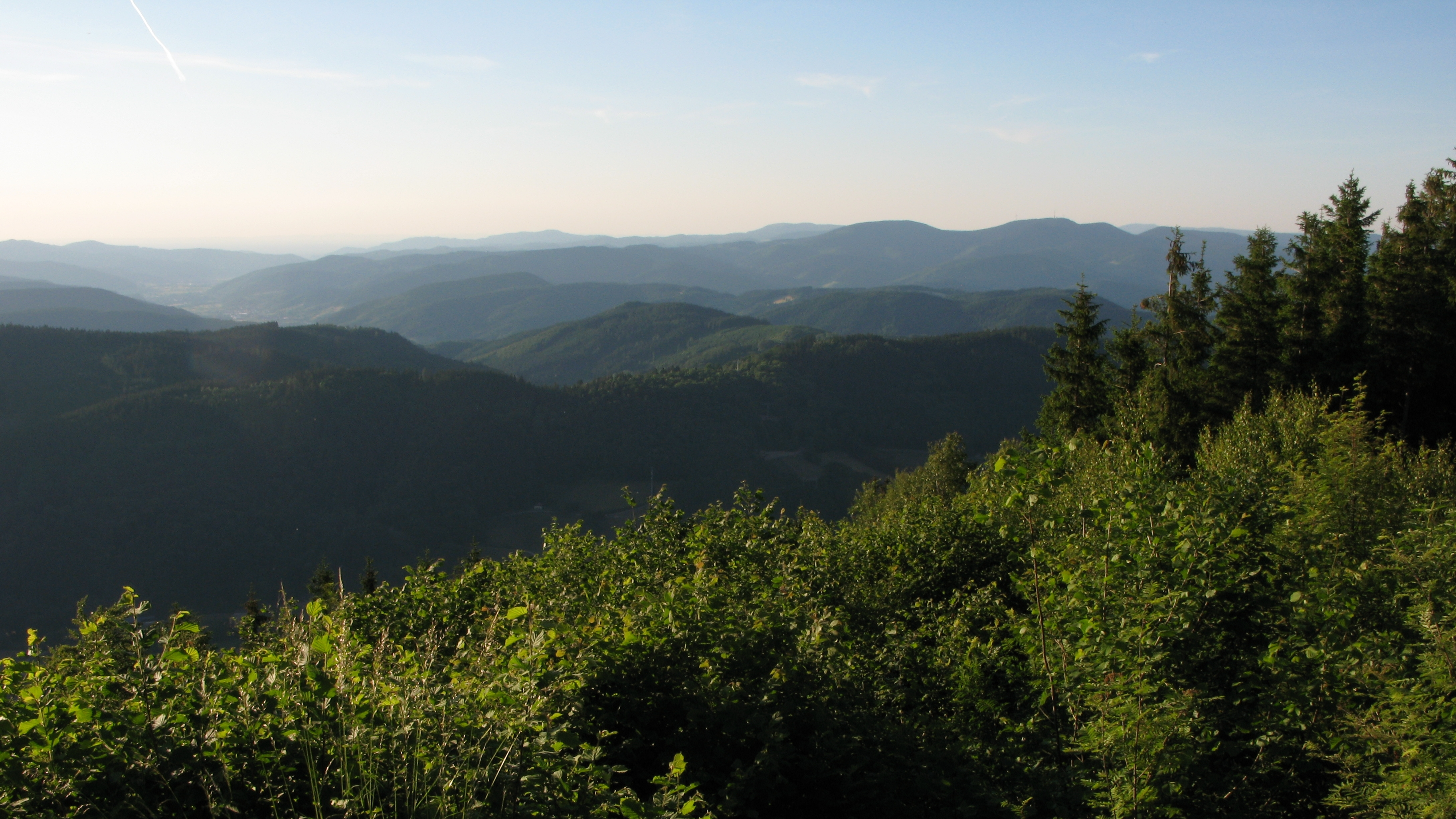 Sicht von der Kapfhütte am Zweitälersteig im Schwarzwald auf das Kinzigtal im linken, oberen Bildrand.